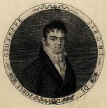 Giuseppe Siboni (1780-1839), italiensk-dansk syngemester